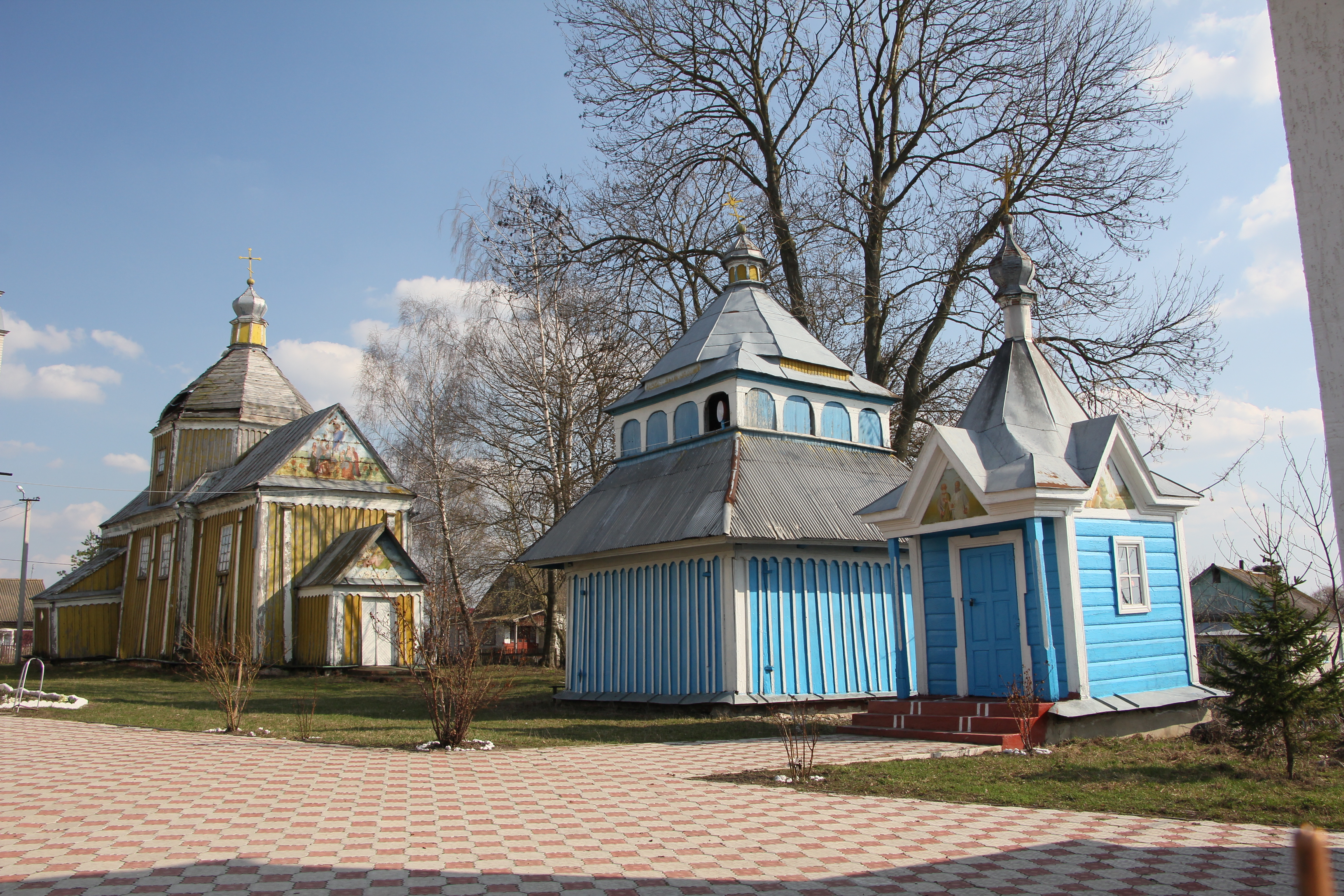 Дерев'яна церква в селі Юськівці Лановецького району, Тернопільської області